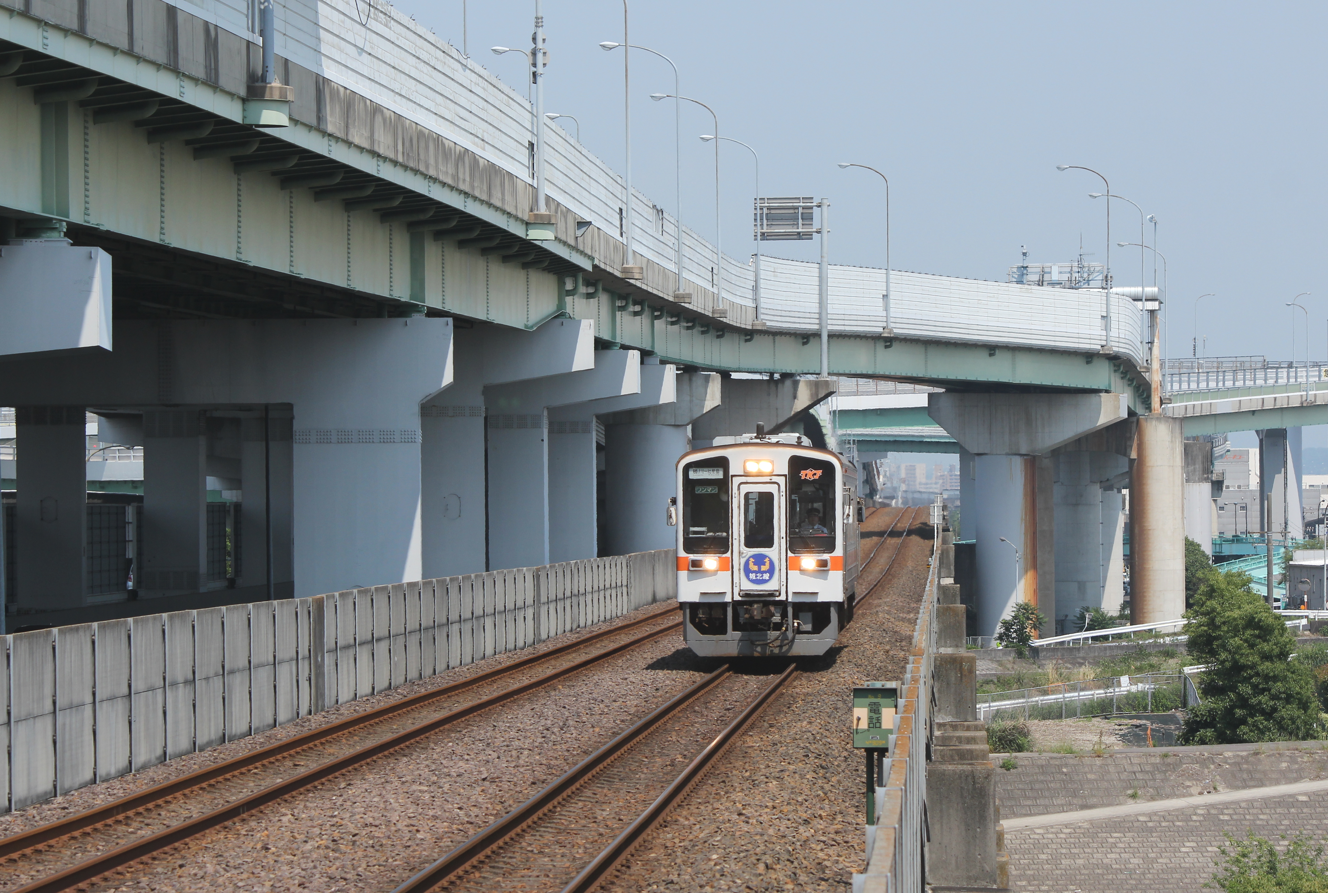 楠JCTと東海交通事業城北線 Canon EOS Kiss X5